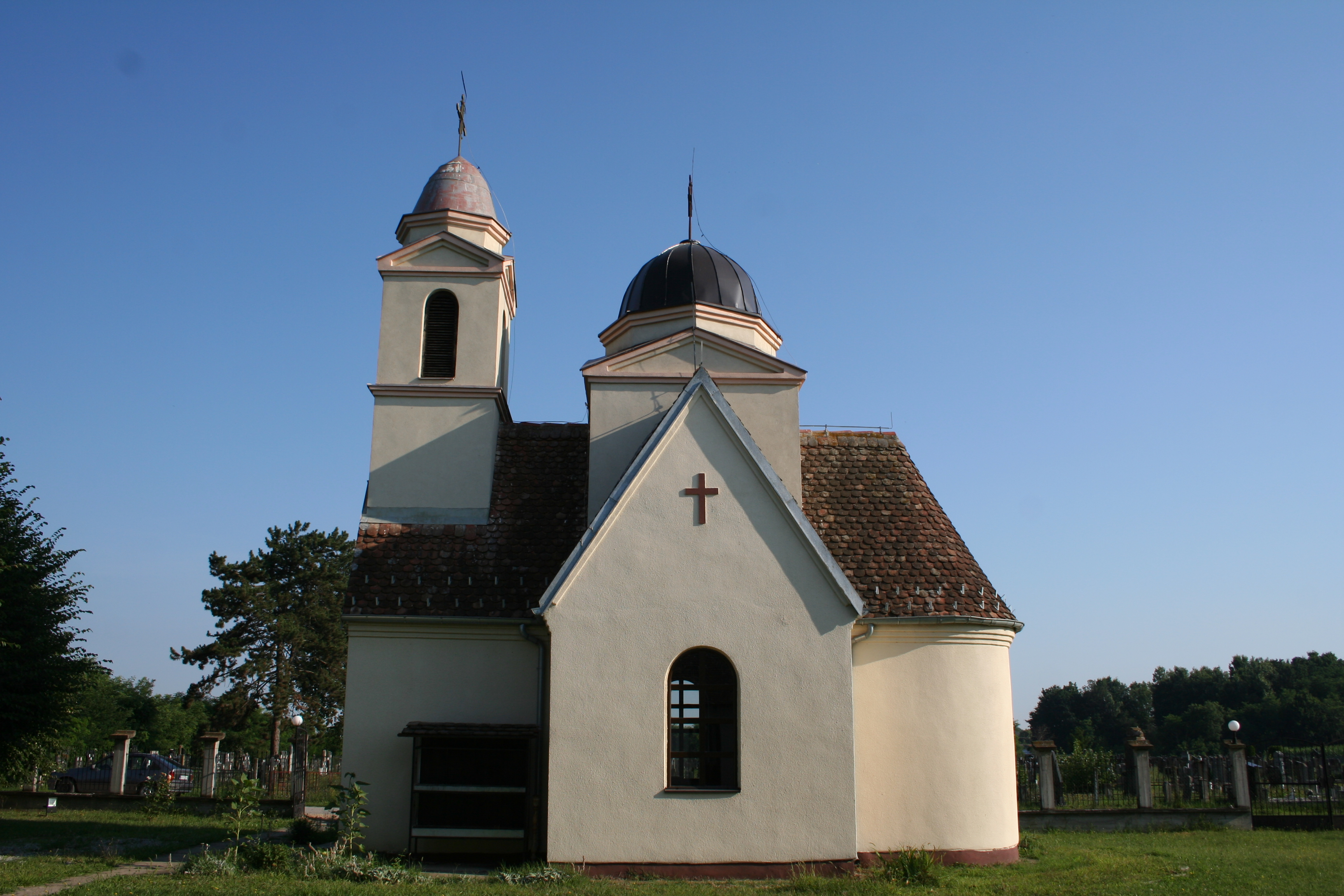 Crkva Sv. Marije Magdalene, Bogosavac